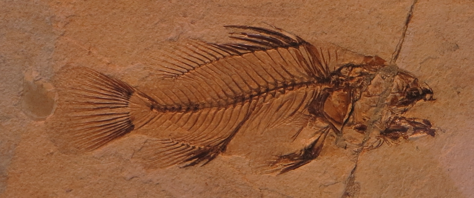 Fossil of fish- Took the picture at Natural History Museum, Bonn University